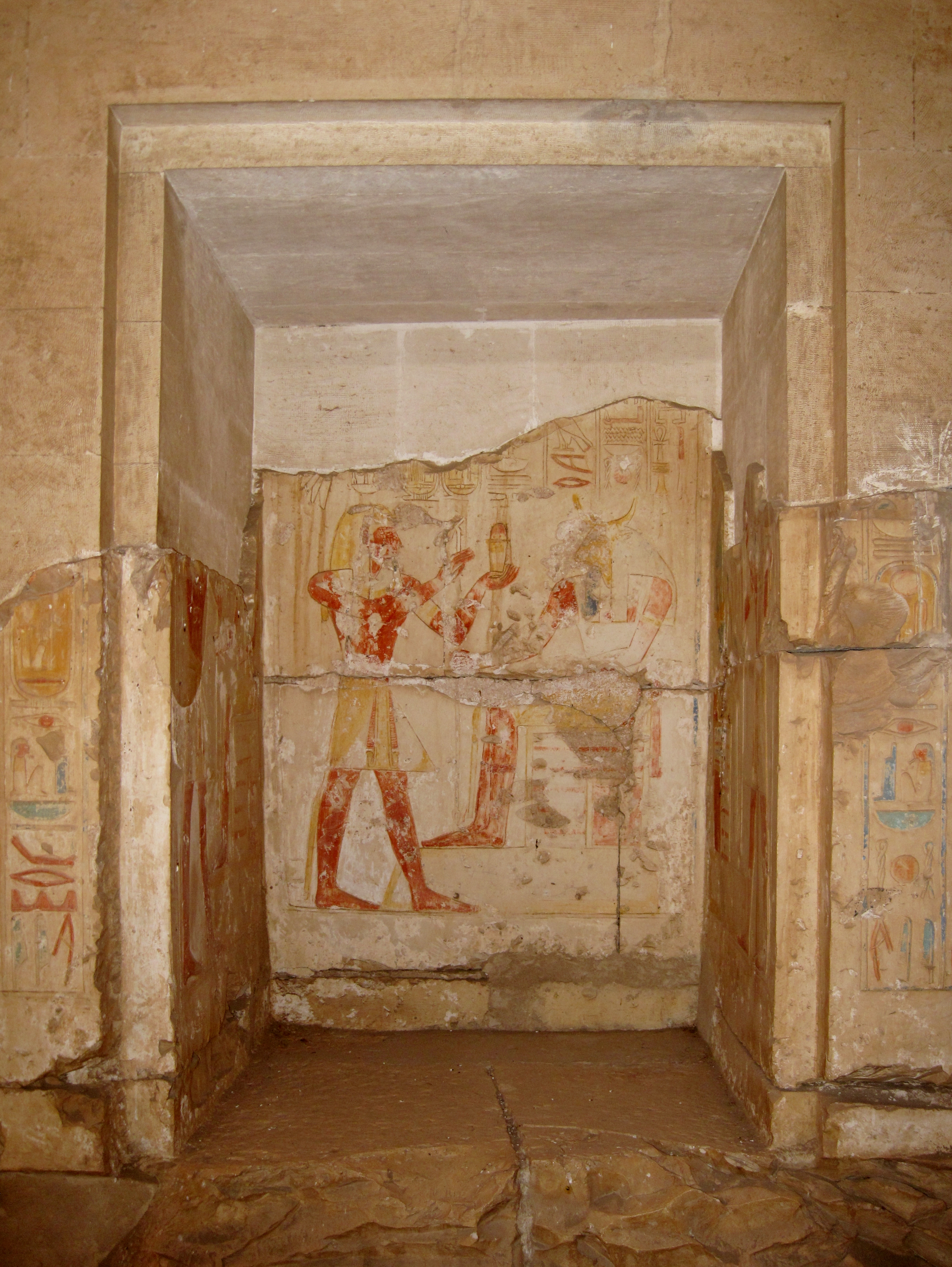 Wandnische mit Reliefs in der nordwestlichen inneren Kapelle (Neunheit) im Tempel Ramses II. in Abydos, Ägypten